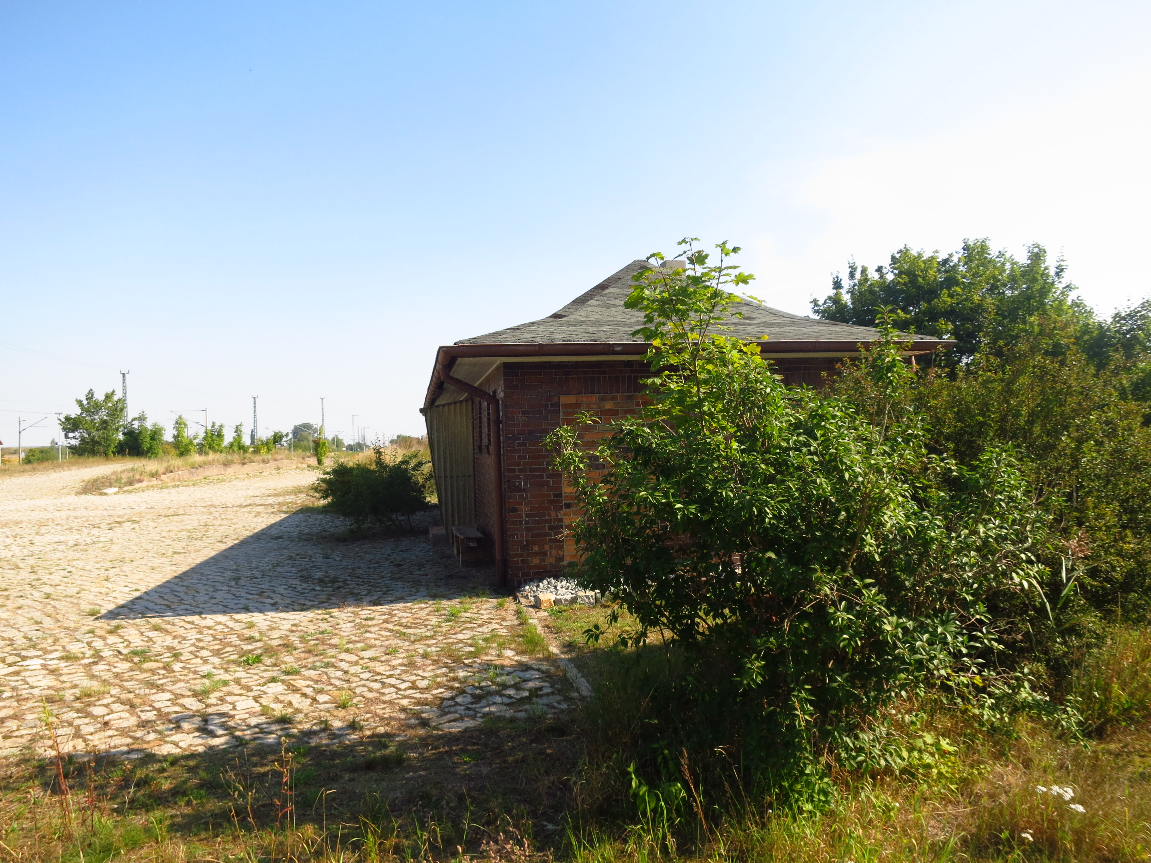 ehem. Empfangsgebäude des Schmalspurbahnhofs Altefähr, Kulturdenkmal